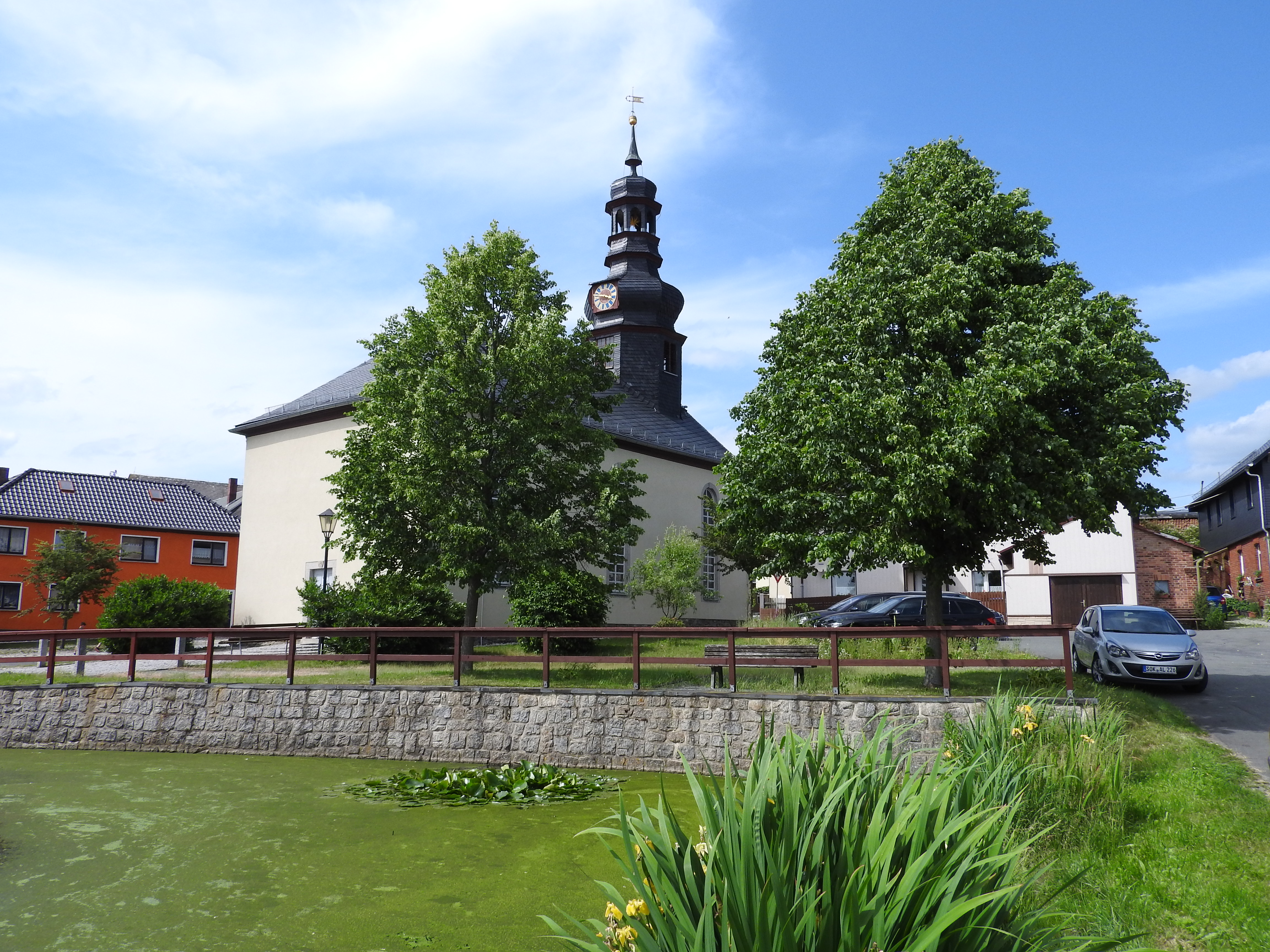 Kirche in Eßbach, Thüringen